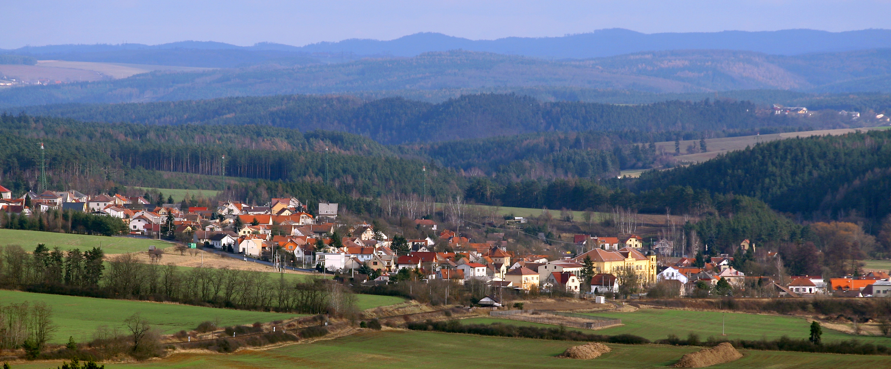 Severní, historická část Třemošné, pohled od západu.